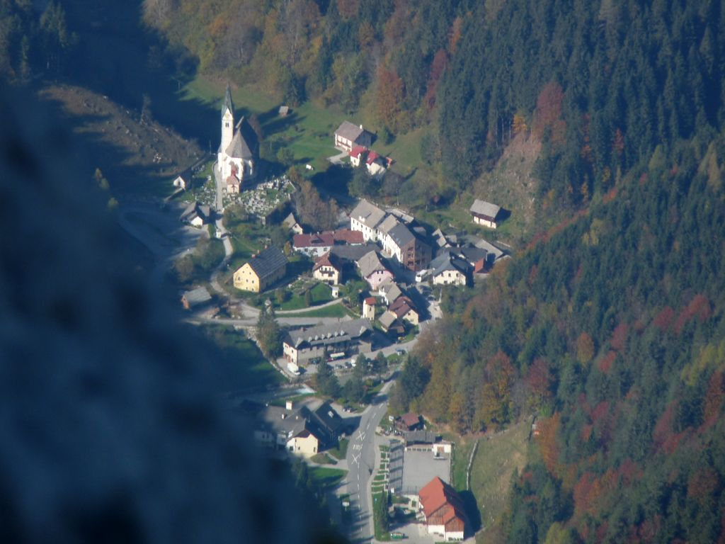 Solčava